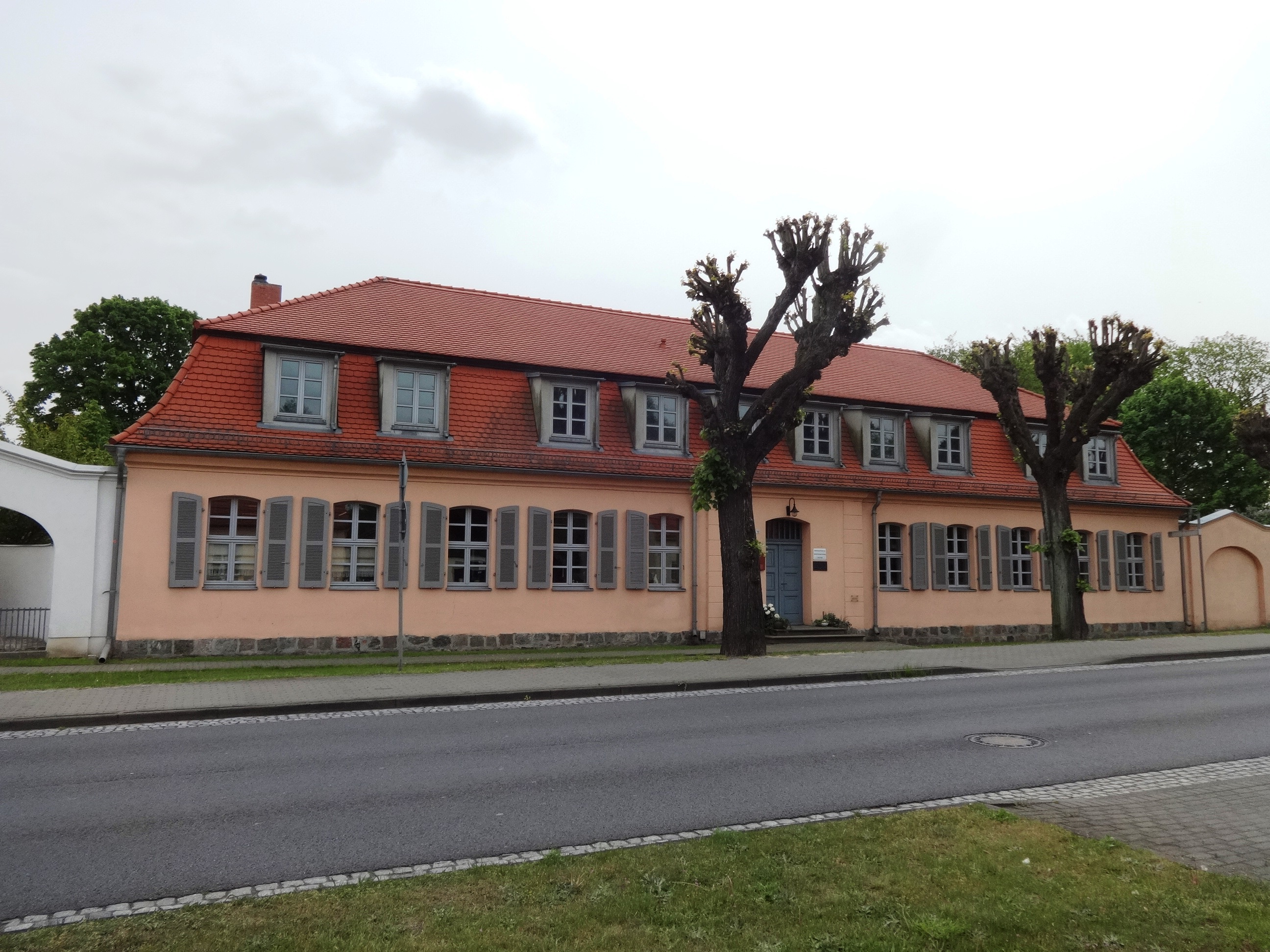 Die Manufaktur der Weberkolonie entstand als Fabrikantenhaus für Weber im Jahr 1776. Im 19. und 20. Jahrhundert wurde es als Schule und Jugendheim genutzt. Im 21. Jahrhundert befindet sich in dem Bauwerk ein Weberei-Museum sowie ein Restaurant.